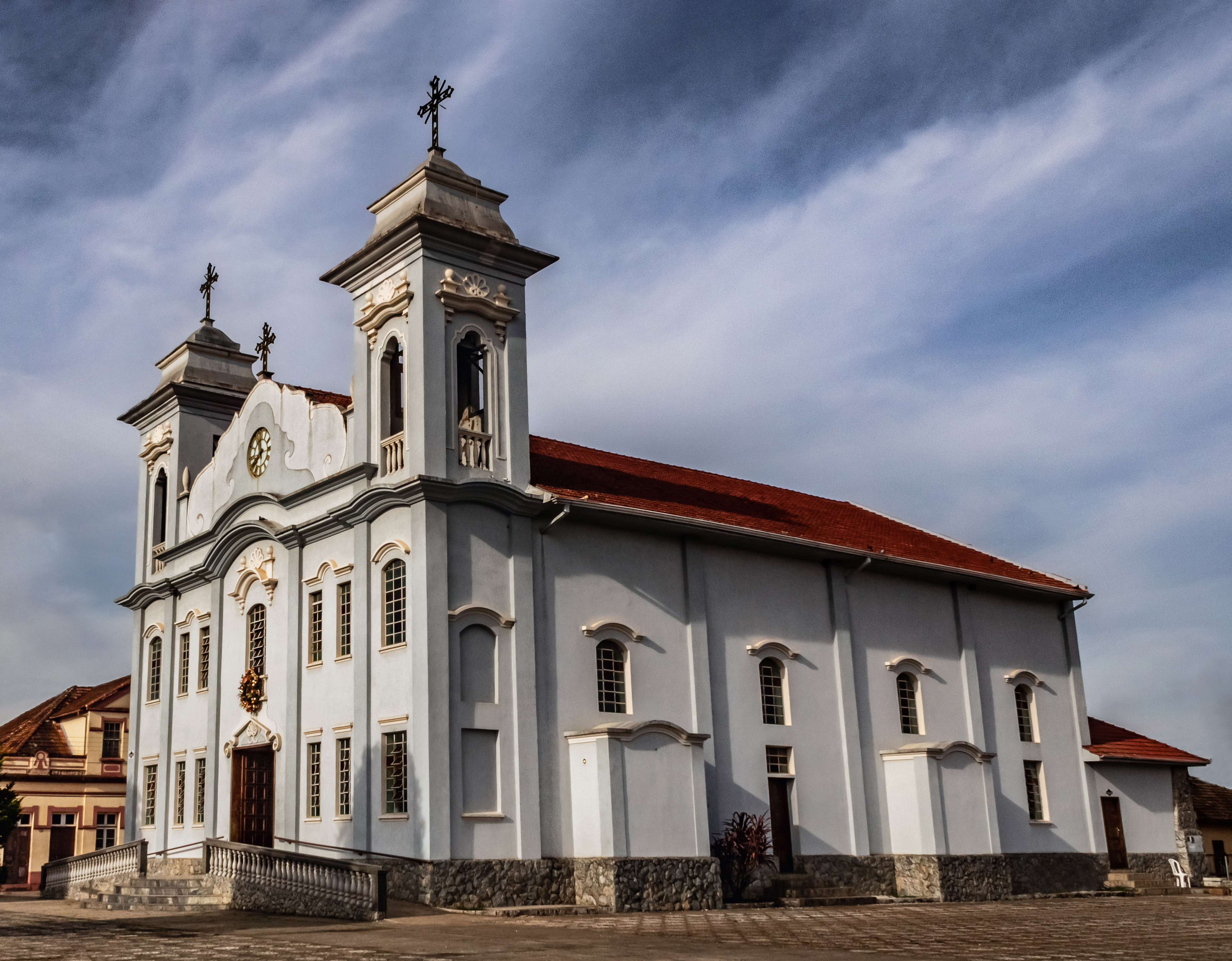 A Igreja Matriz do Senhor Menino Jesus foi construída em 1859 e está localizada em Piraí do Sul, Paraná.